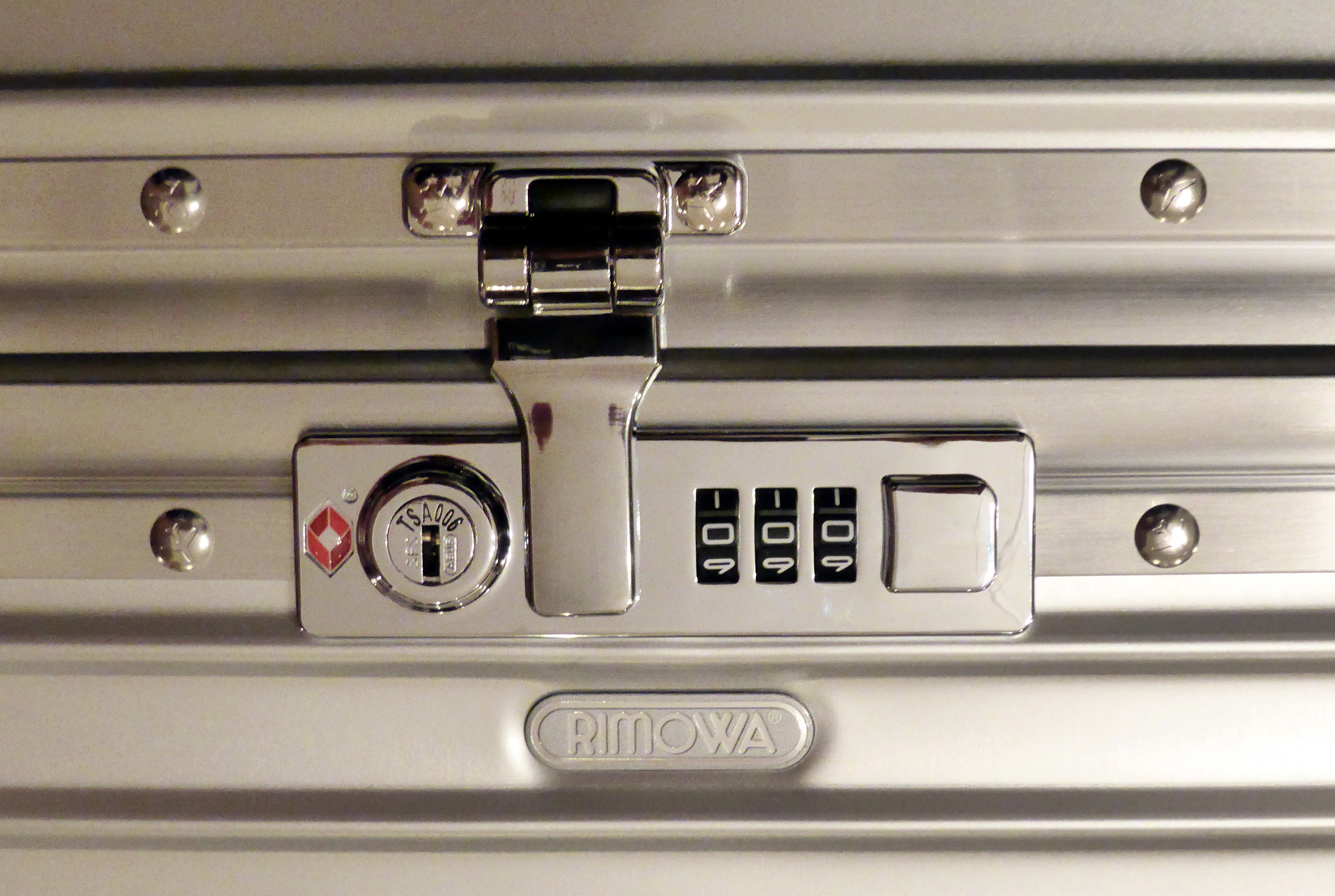 Rimowa-Koffer der Classic-Flight-Serie (TSA-Schloss).